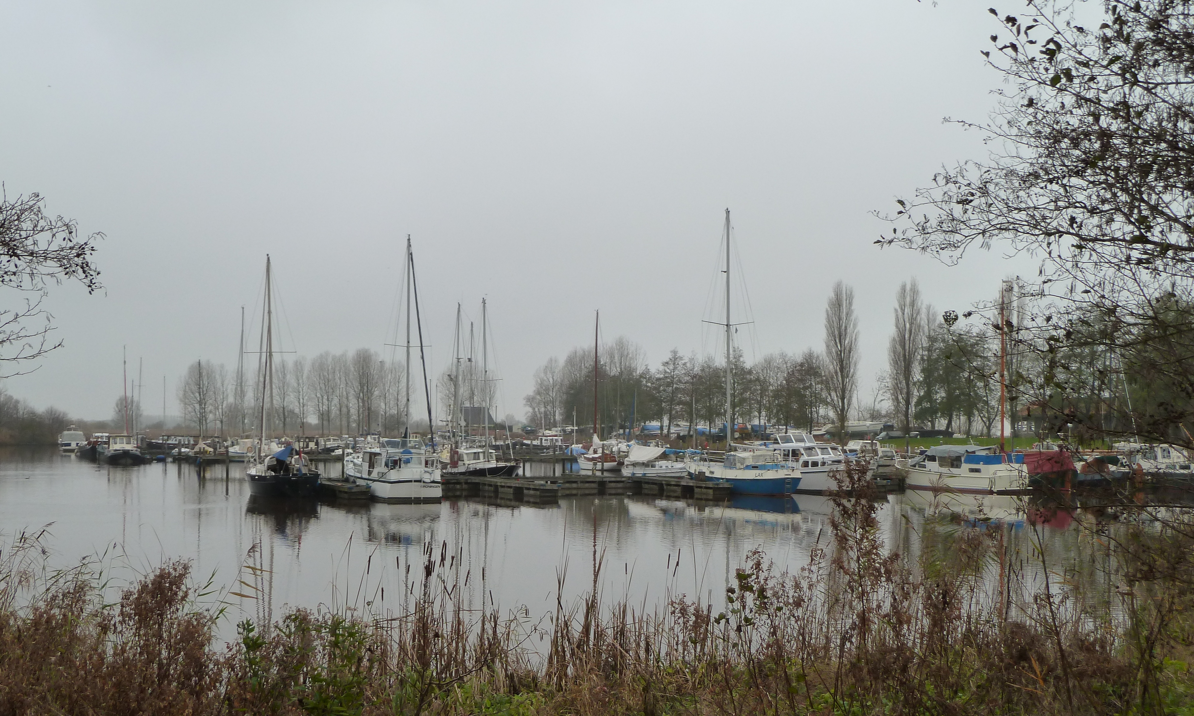 Gezicht op het Hunzegat, de jachthaven van Zoutkamp, die werd aangelegd na de bedijking van de Lauwerszee.